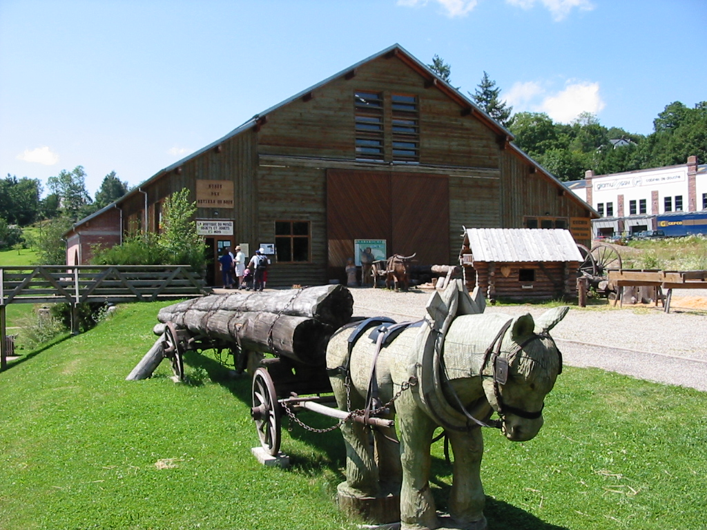 Musée des métiers du bois à Labaroche (Haut-Rhin)